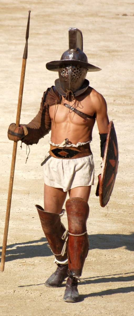 ACTA Combats historiques Hoplomaque équipé de jambières, lance, galea et bouclier